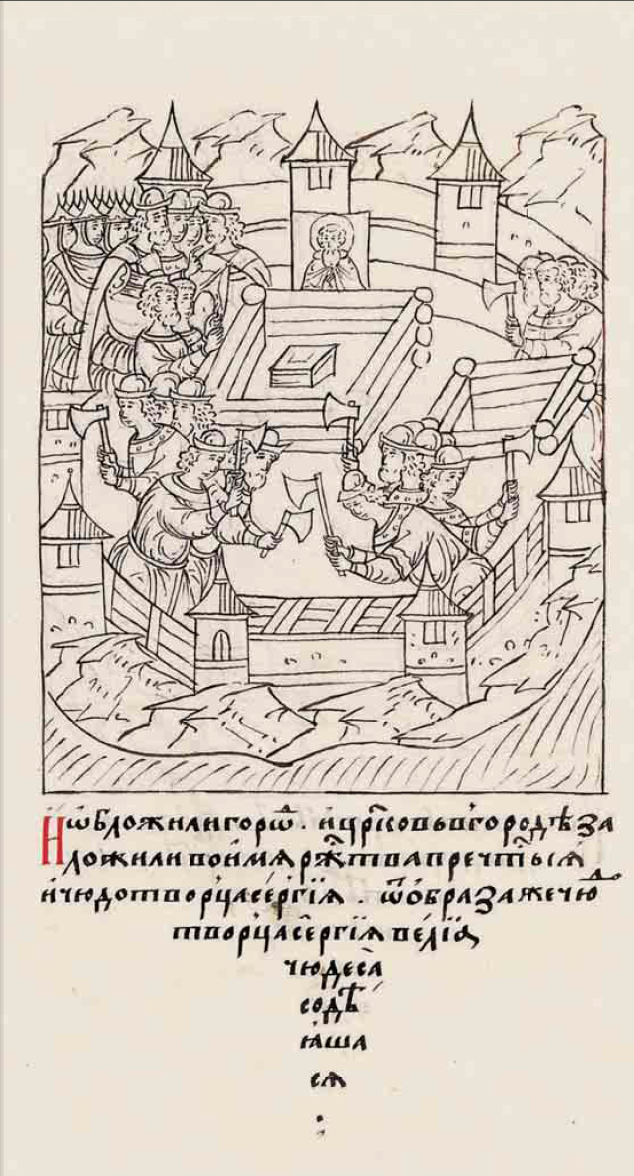 Свияжск Лицевой летописный свод (Книга 20 стр.444) подпись под изображением: И обложили городъ и церковь въ городе заложили во имя Рождества Пречистыя и чюдотворца Сергия, отъ образа же чюдотворца Сергия велиа чудеса содеяшася